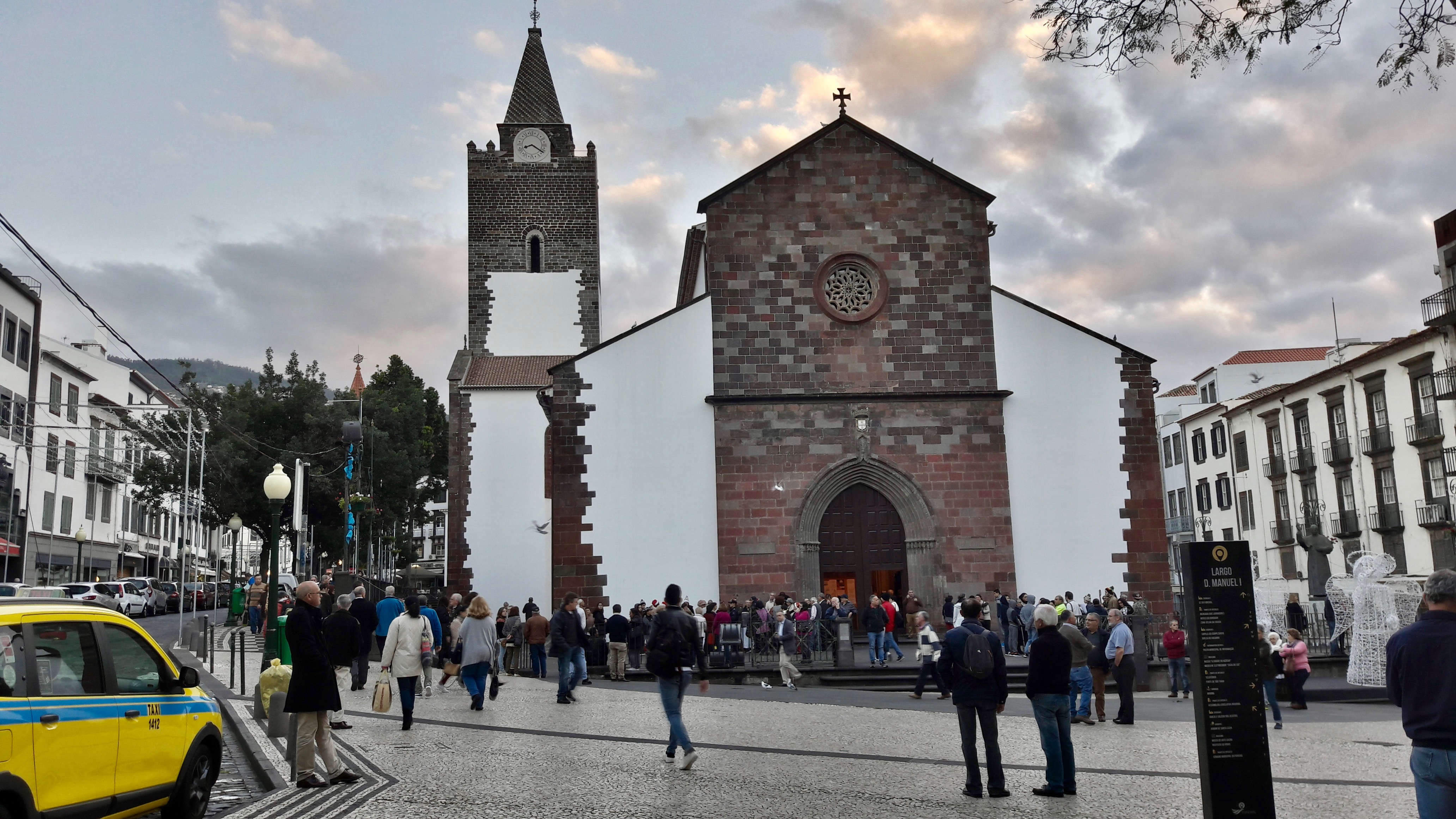 Sé do Funchal, ilha da Madeira